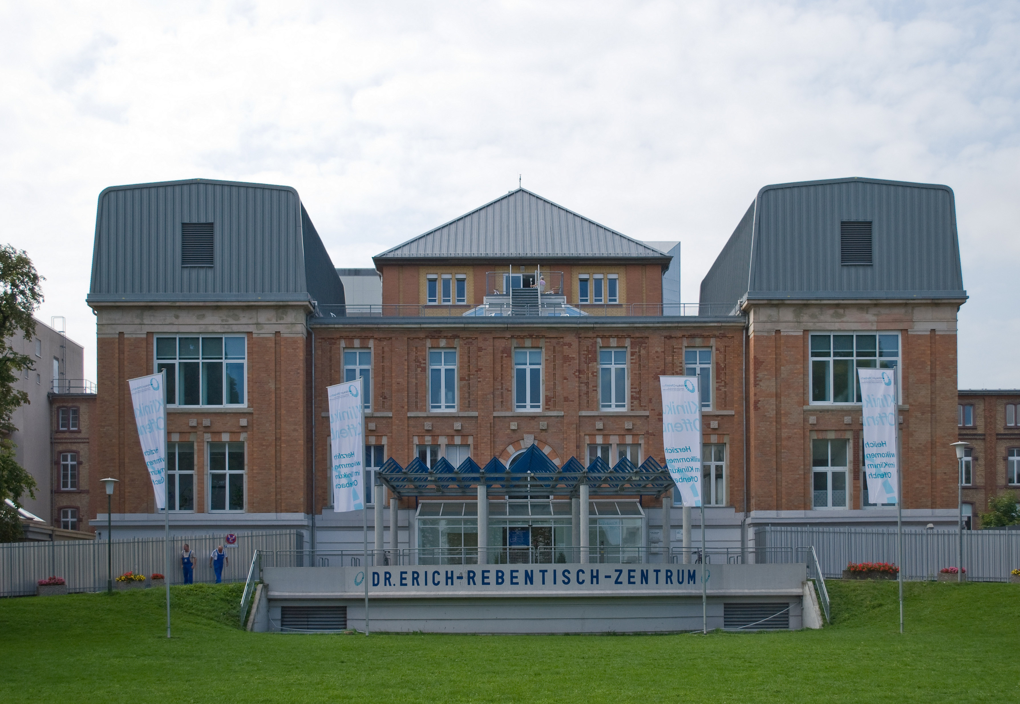 Das Klinikum Offenbach am Main, hier das Dr.Erich-Rebentisch-Zentrum